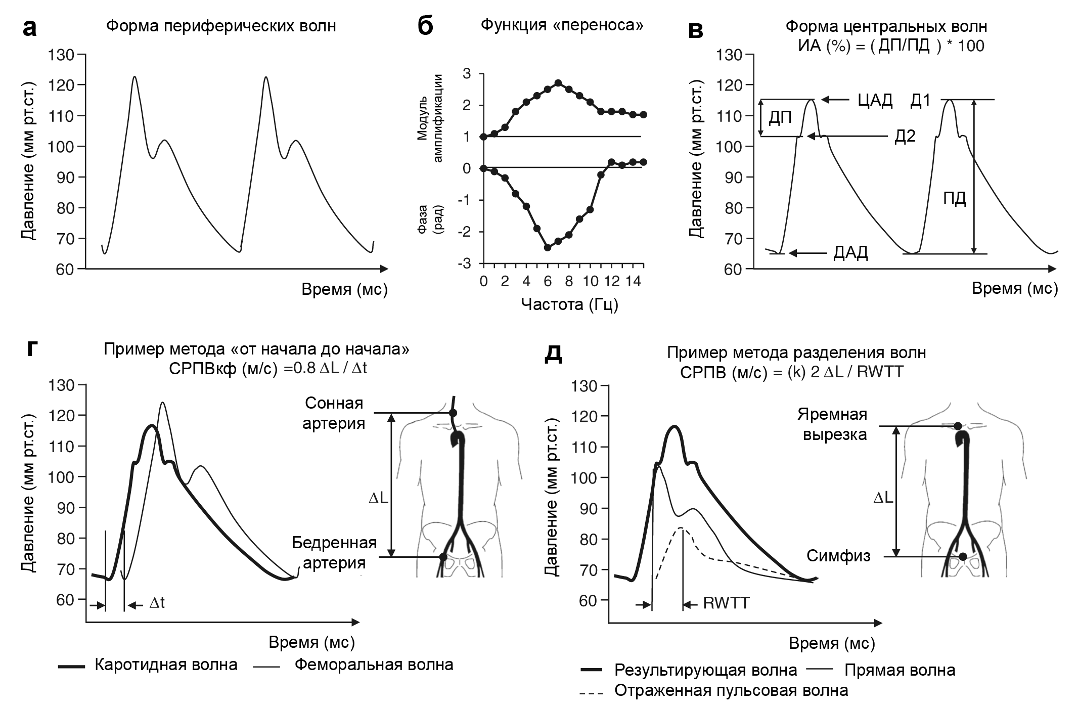 а) сигнал периферической пульсовой волны (например, из плечевой артерии) записан. б) Этот сигнал анализируется с помощью математического алгоритма, основанного на передаточной функции, с определенной амплитудой и фазовыми характеристиками. в) После этого реконструируется сигнал центральной пульсовой волны. Из этого сигнала получены центральное артериальное давление (ЦАД), диастолическое артериального давления (ДАД), пульсовое давление (ПД). Индекс аугментации (ИА) вычисляется как соотношение между давлением приросста (ДП) и ПД, выраженное в процентах. г) скорости пульсовой волны (СРПВ), может быть вычислена в соответствии с методом "от начала до начала", например, для каротидно-феморальной СРПВ путем умножения сонную-бедренного расстояние (ΔL) на 0,8 и делением результата на интервал времени (Δt) между сигналами волн на сонной и бедренных артериях. д) В качестве альтернативы, для амбулаторного оценки, СРПВ может быть получена путем умножения "длины аорты" (ΔL, расстояние jugulum-symphisis или поверхностное морфологическое расстояние, соответствующее проекции аорты на поверхности тела) на 2 и константу (k ) и делением результата на время прохода отраженной волны (RWTT, интервал времени между прямой и отраженной волнами).